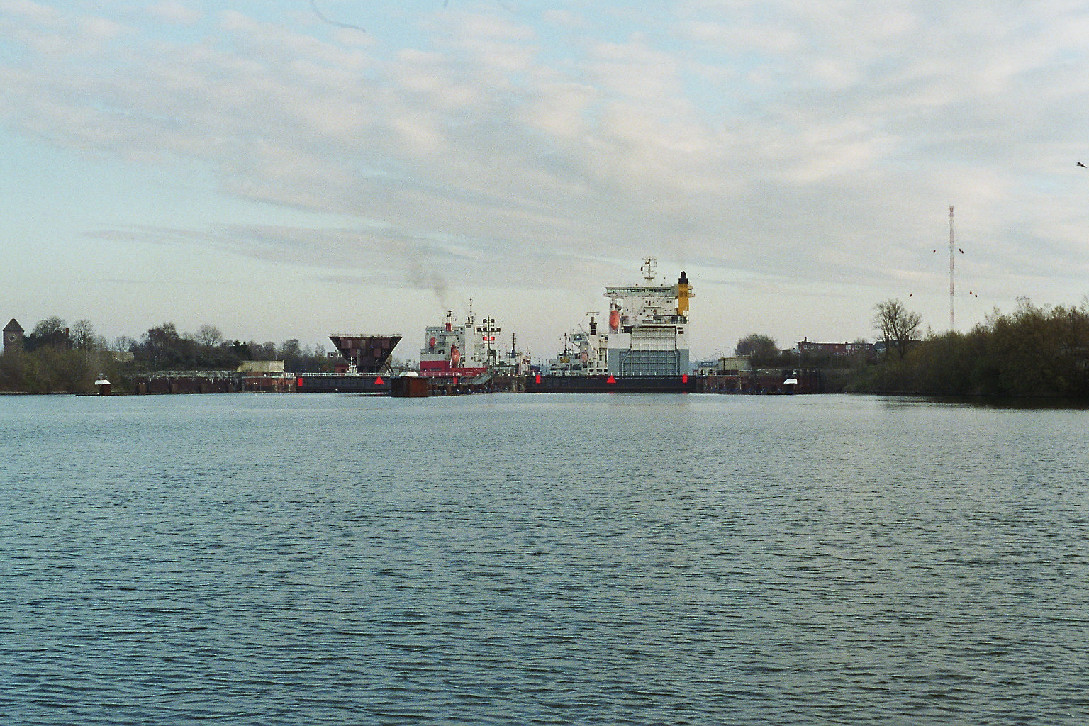 Beschreibung/description Schleuse in Kiel-Holtenau, Nord-Ostsee-Kanal, Deutschland sluice in Kiel-Holtenau, kiel-canal, Germany Quelle/Source Fotograf oder Zeichner/photographer or drawer Schmull, de Datum/date 01/2006 Andere Versionen/other version